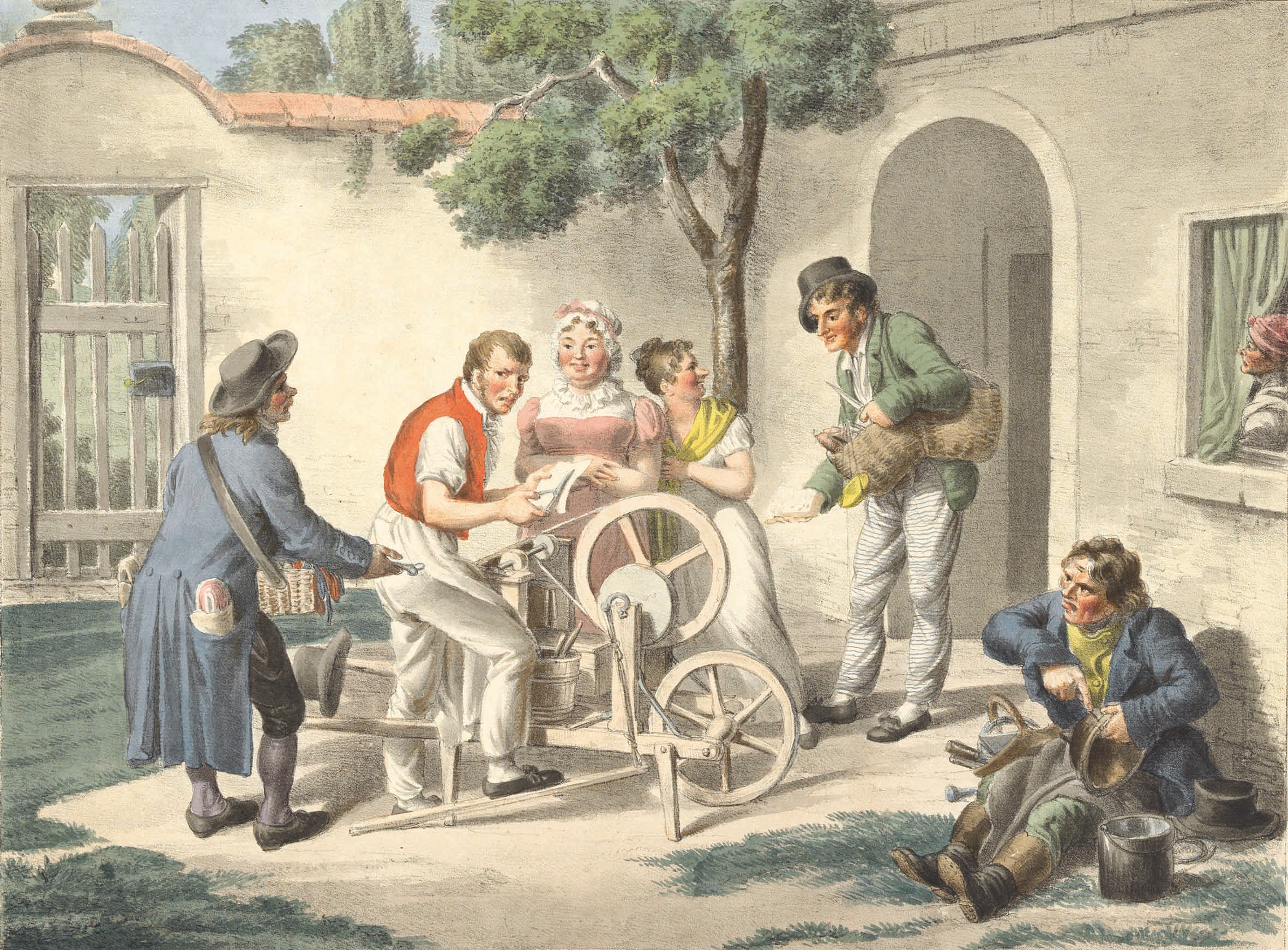 Scherenschleifer (Lithografie, Exponat der Ausstellung Wiener Typen - Klischees und Wirklichkeit. Wien Museum, 2013)